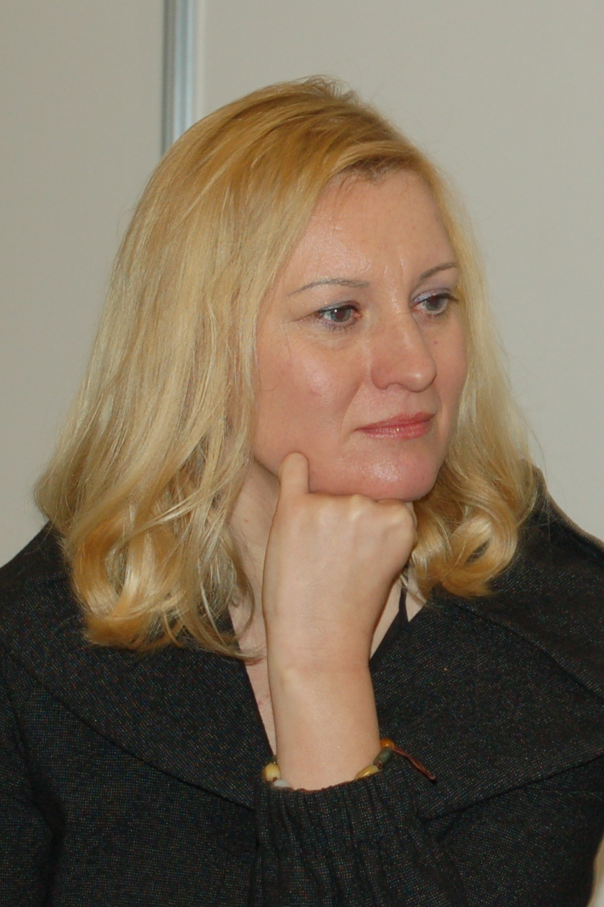 Vytauto Didžiojo universiteto dėstytoja, literatūrologė Asta Gustaitienė